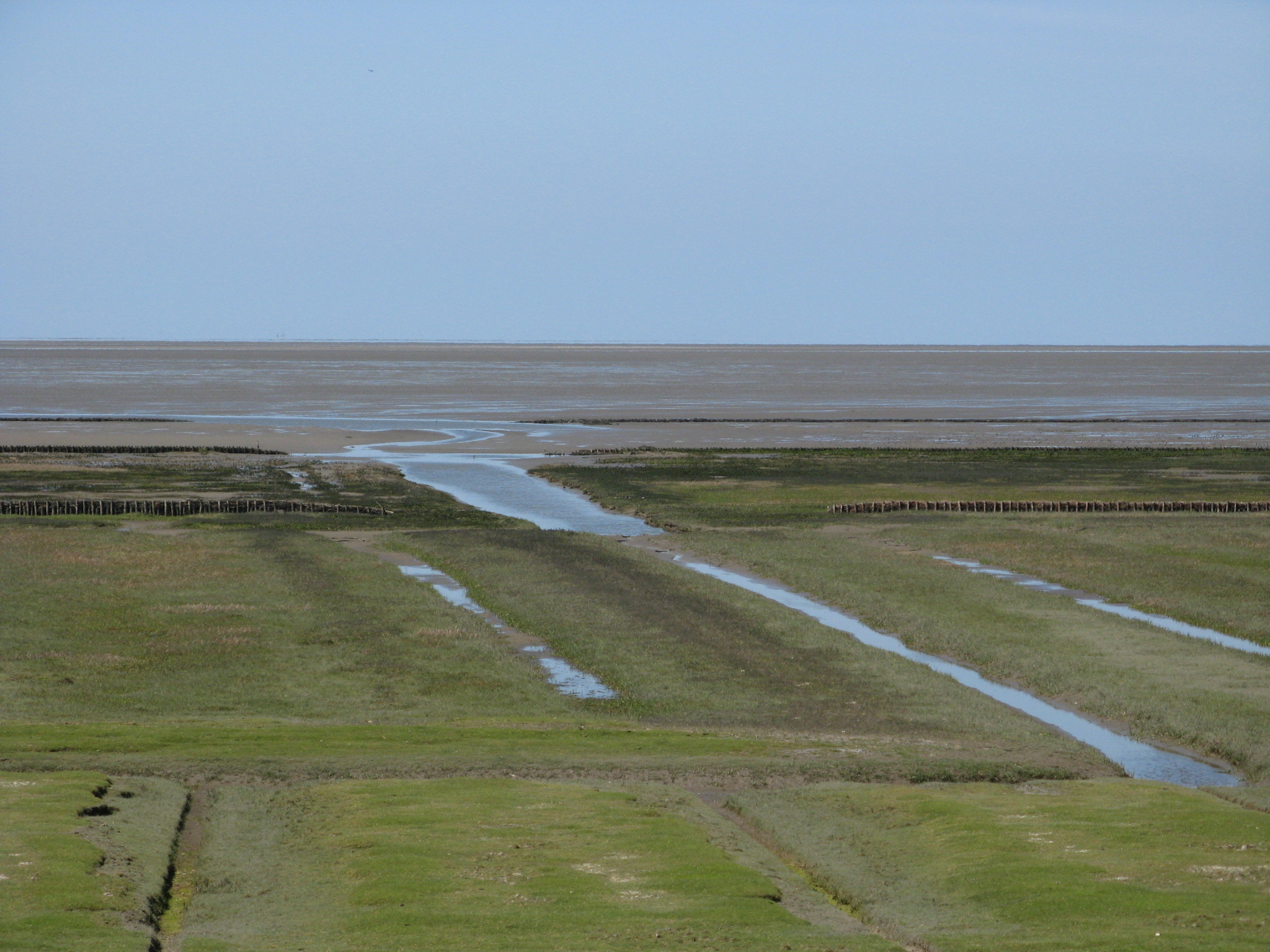 Dike Wesselburenerkoog